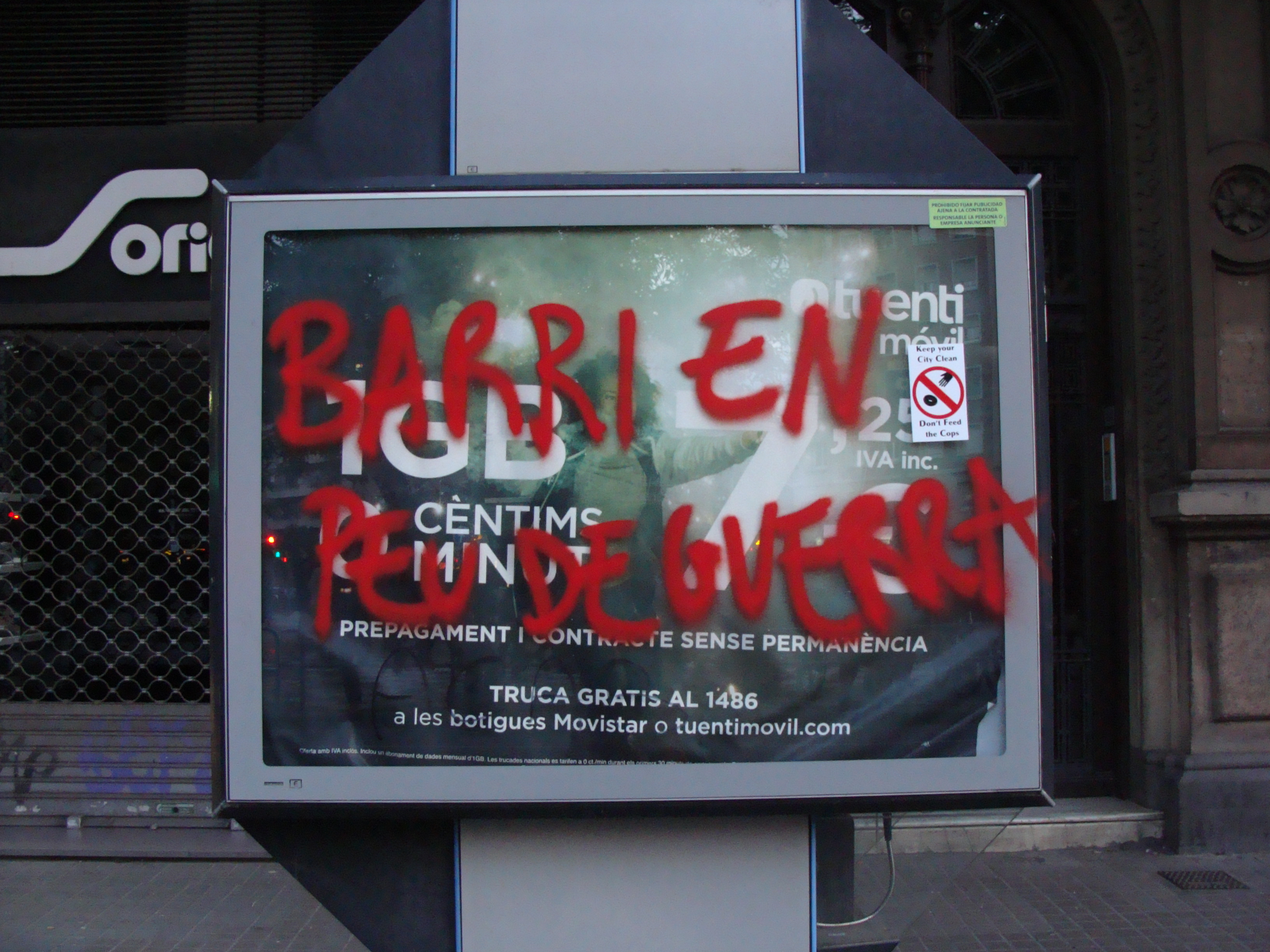 Protestes per Can Vies, al carrer i plaça de Sants